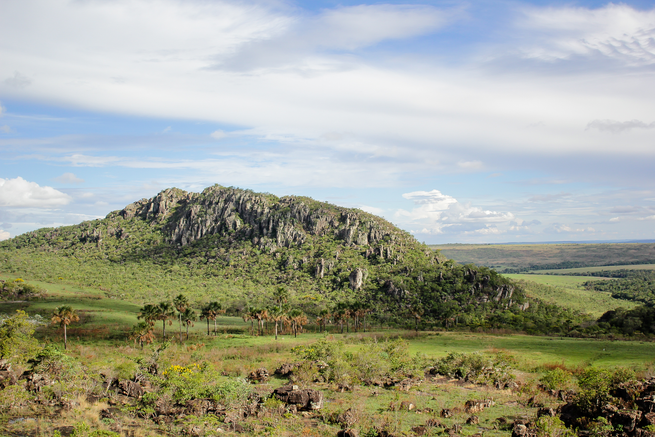 Morro do do cabeludo no parque estadual do pireneus